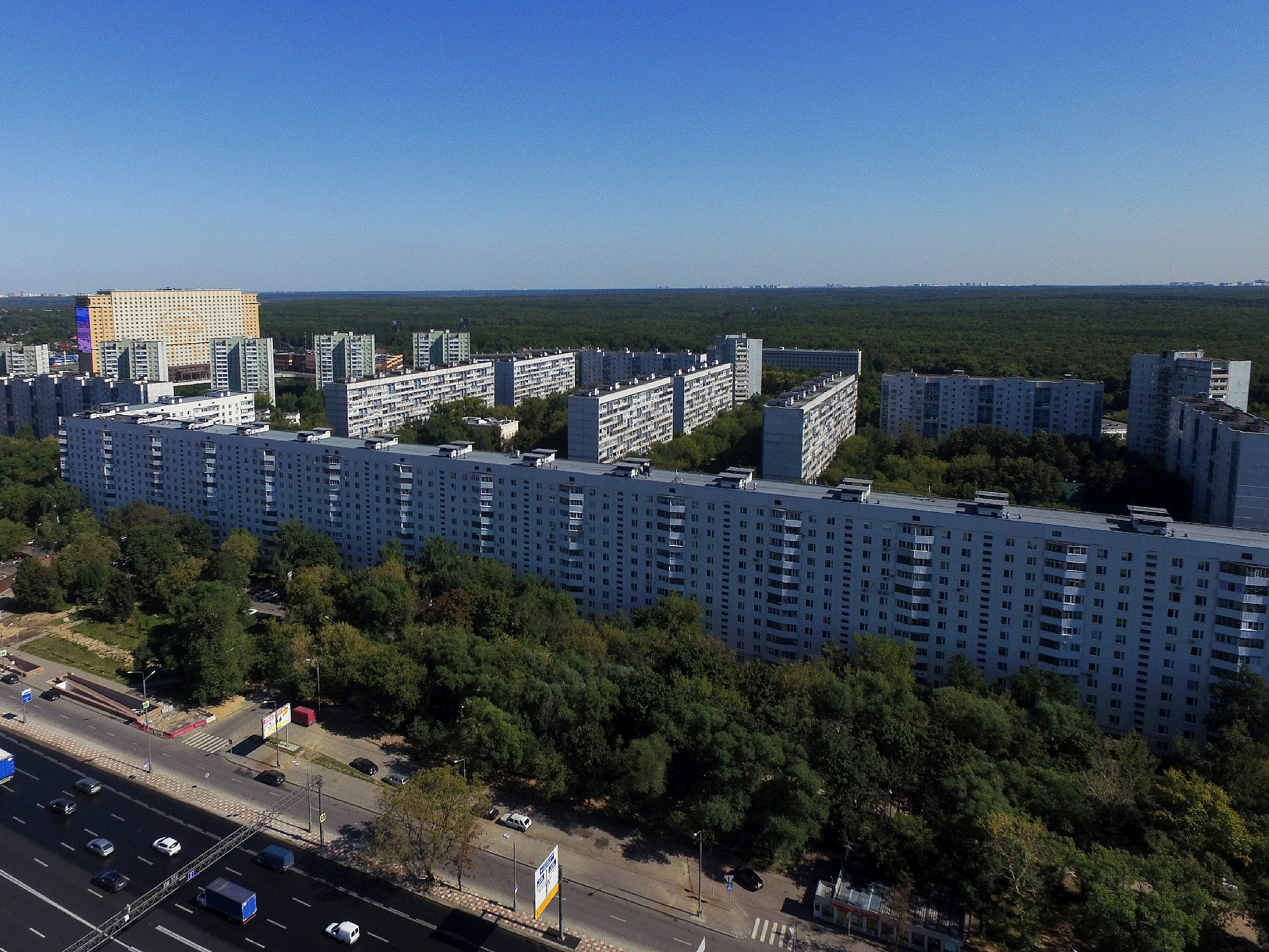 Ярославский район в августе 2015, улицы Ротерта и Проходчиков, фото со стороны Ярославского шоссе